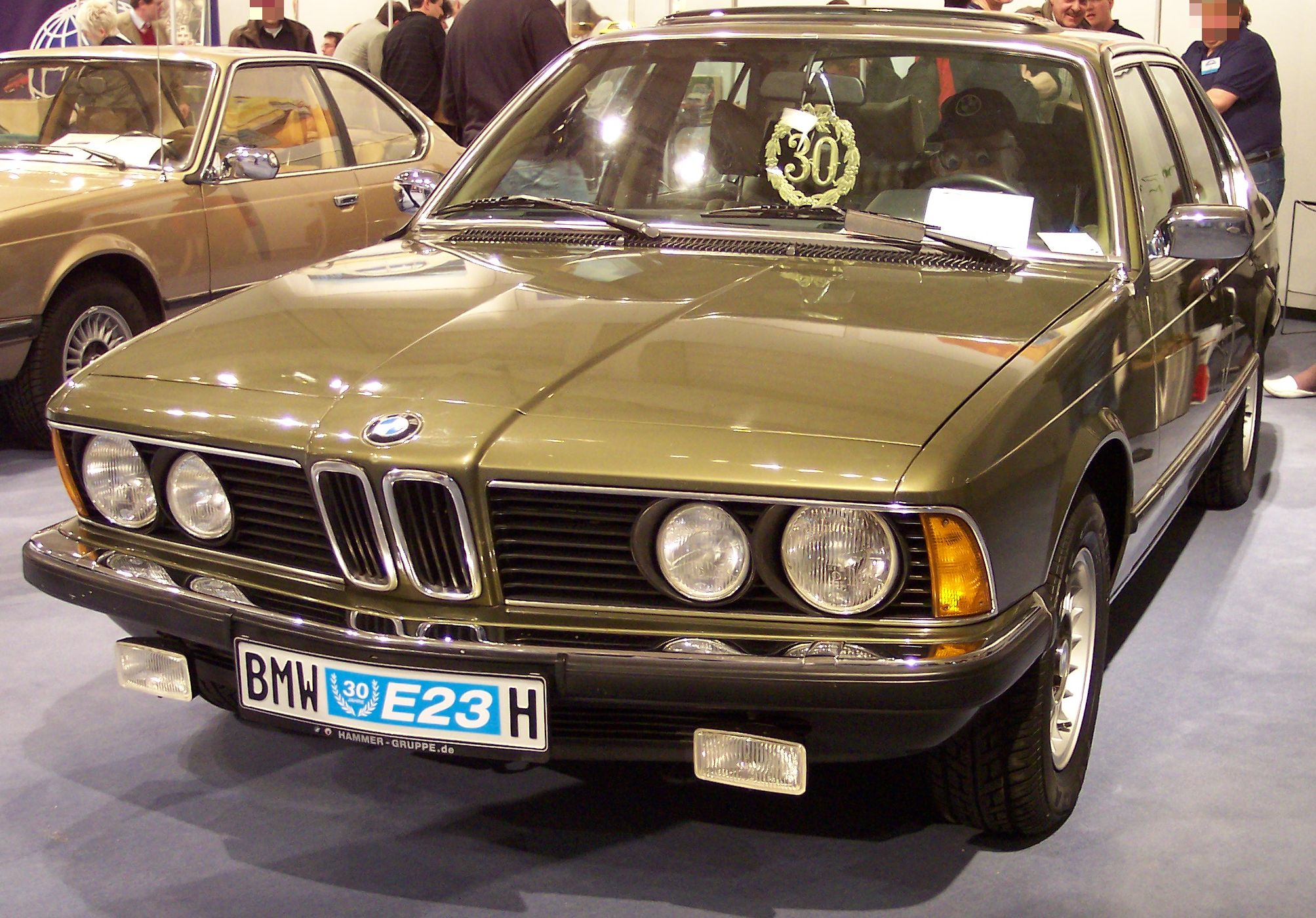 BMW E23